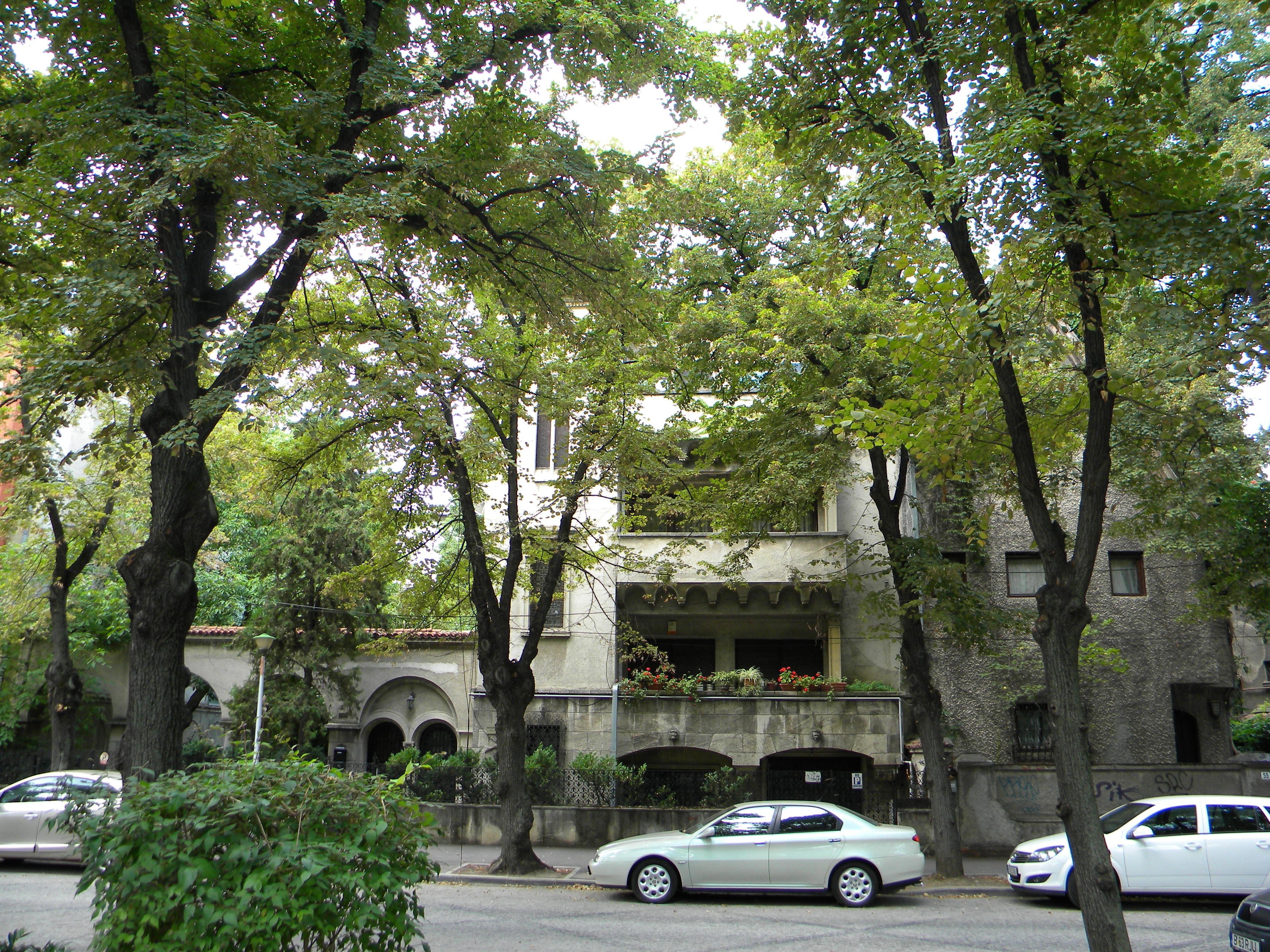 Imobil pe Bd. Aviatorilor, nr. 51-53, Bucuresti sect. 1